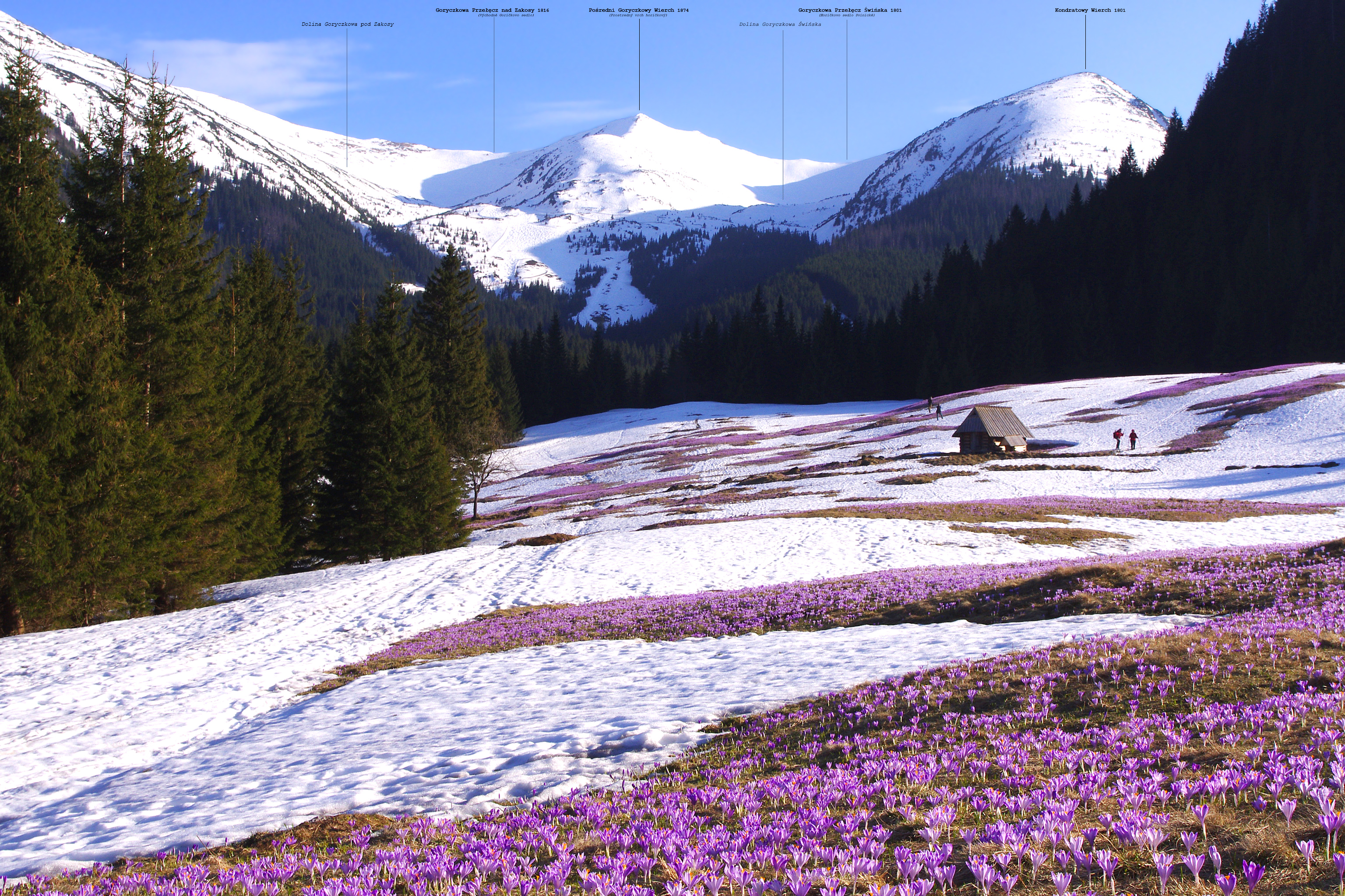 Kalatówki